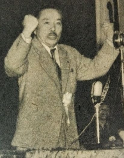 河上利治（大日本生産党第3代党首・赤化防止団団長）